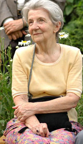 Jorge Sahade escuchando el Coro del Consejo de Profesionales de Ciencias Económicas.